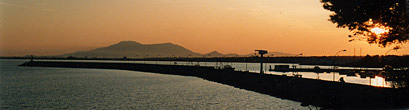 Port de l'Ampolla amb el Montsià al fons